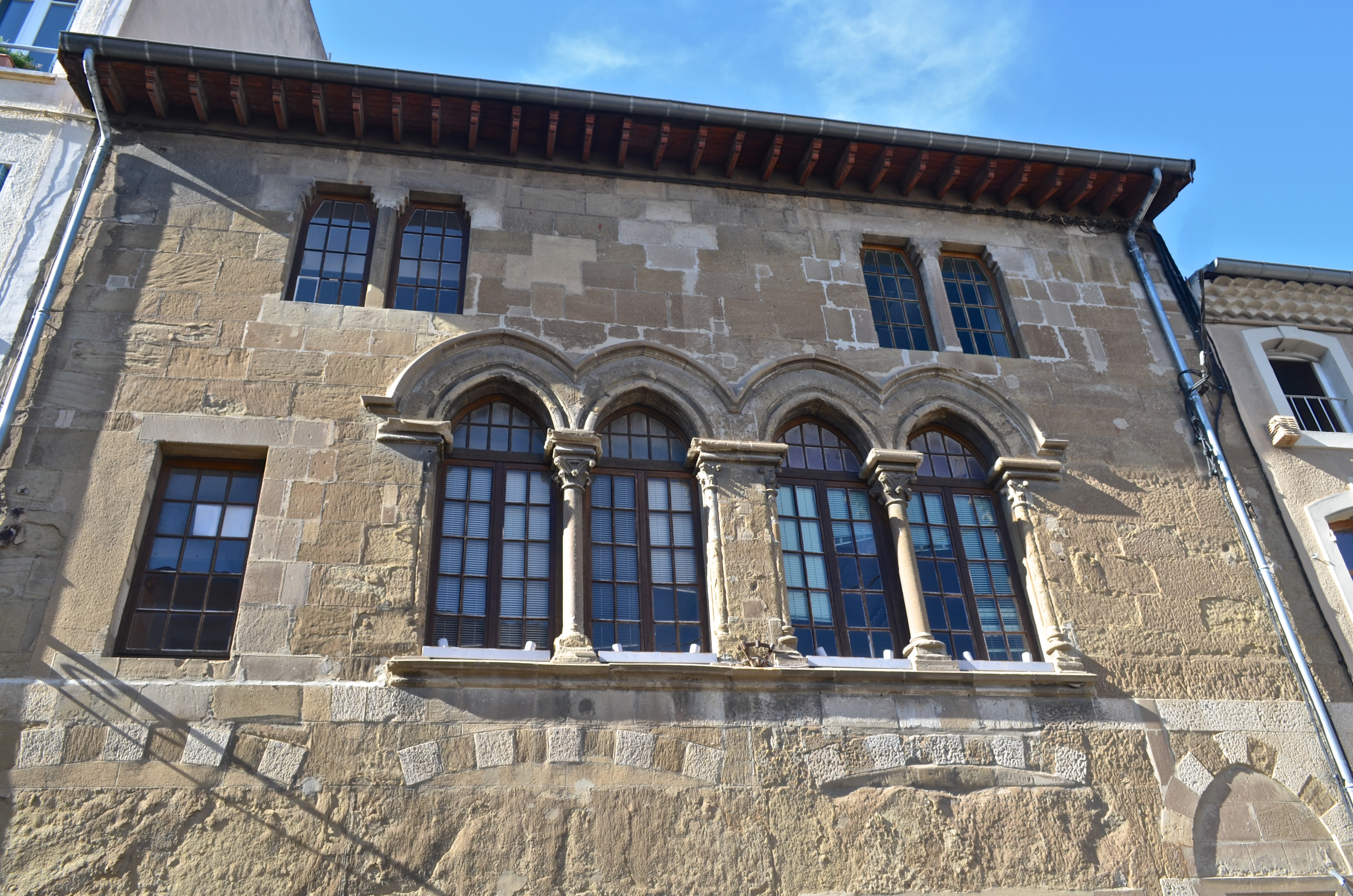 Maison du Drapier à Valence (Drôme, France). Partie haute.